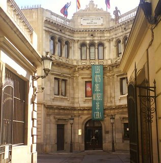 L'entrada a l'establiment